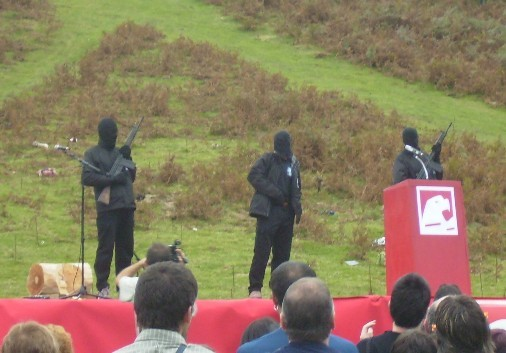 Miembros armados de ETA arengando en el Gudari Eguna de 25 de setiembre de 2006.